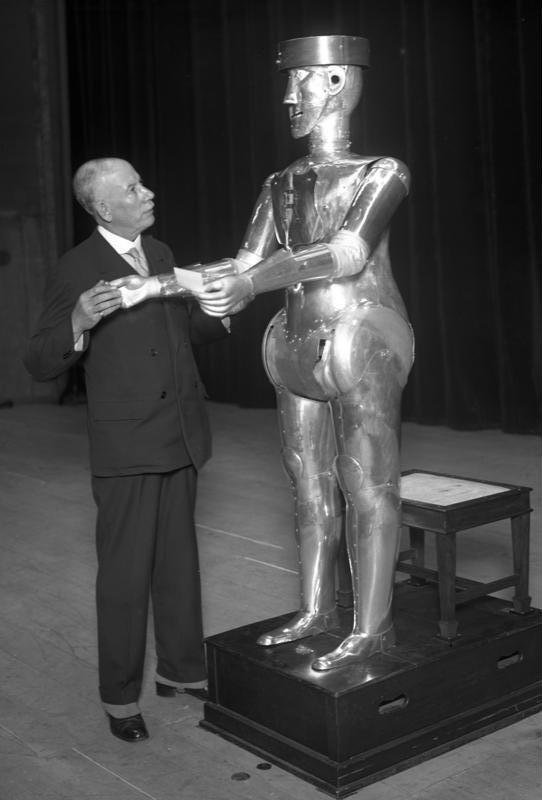 "Robot", der künstliche Maschinenmensch, die Erfindung des englischen Kapitäns Richards! Der künstliche Maschinenmensch "Robot" kann sprechen, den Kopf bewegen, Gegenstände halten und sich verbeugen. Er ist vollständig aus Stahl hergestellt. Der künstliche Maschinenmensch "Robot" und sein Erfinder Richards begrüssen sich.